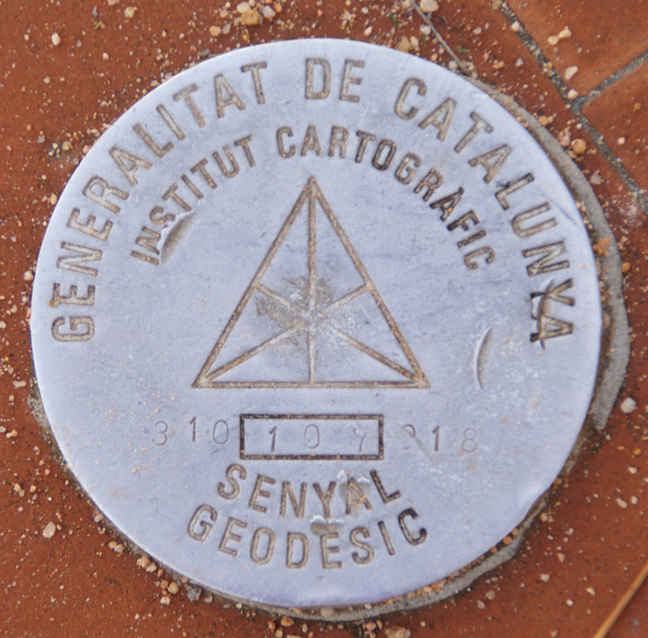 Sant Elm (Sant Feliu de Guíxols) Senyal geodèsic - Geodesic signal